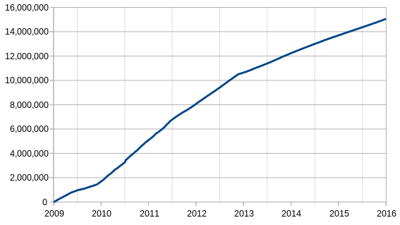 Монгол: /